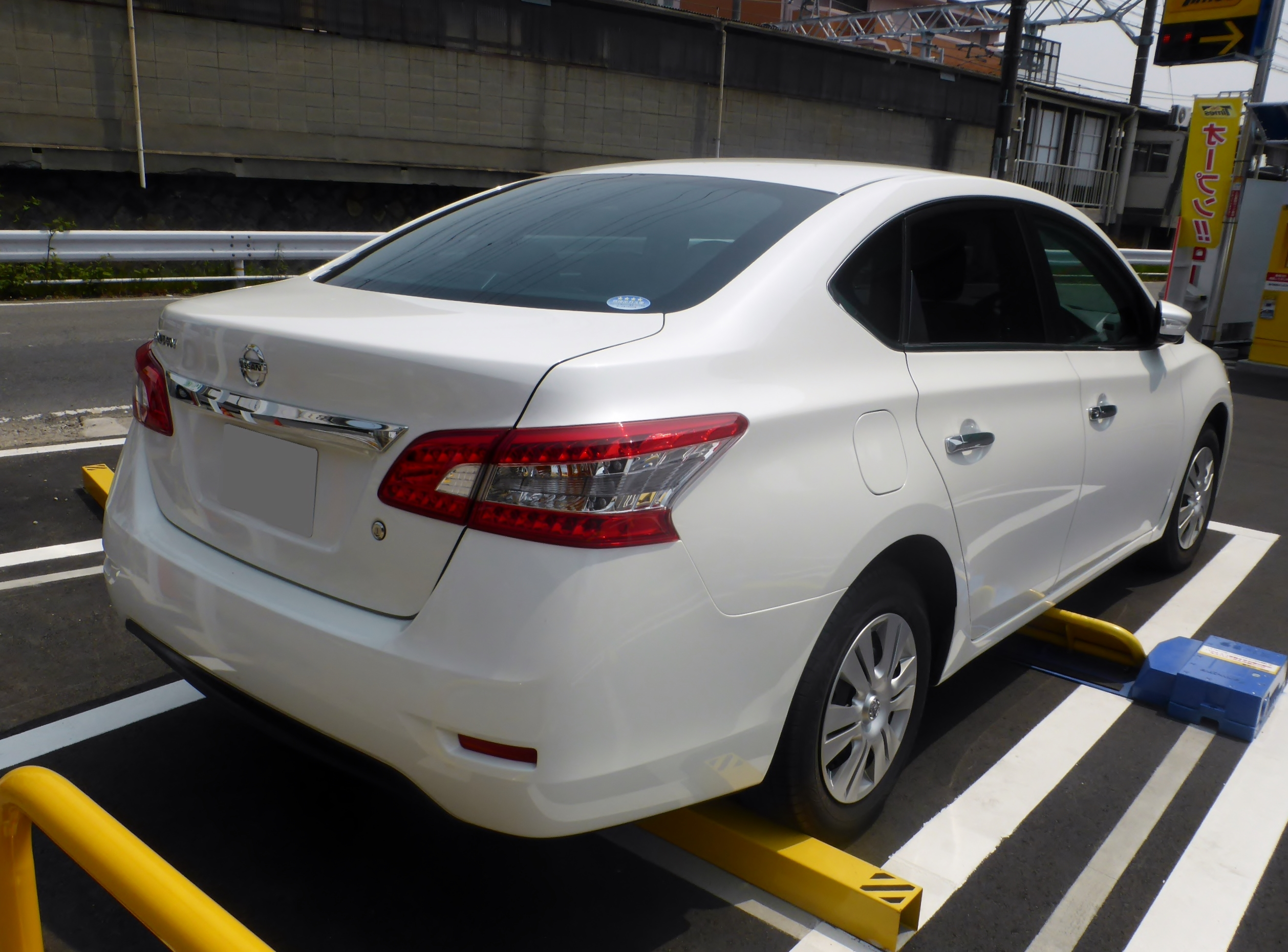 B17型日産・シルフィSをリアから撮影。